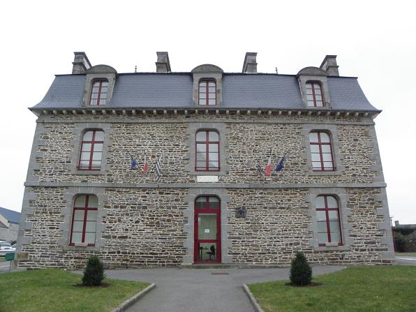 Mairie de La Boussac (35).